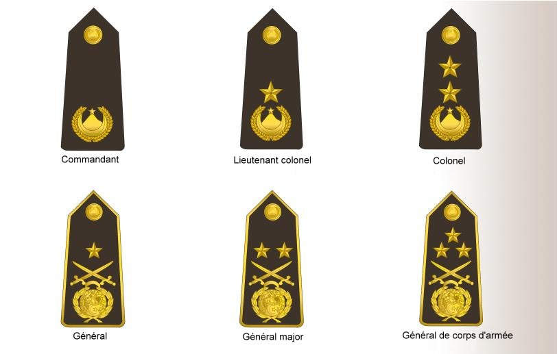 Les différents grades des officiers supérieurs de la Marine algérienne